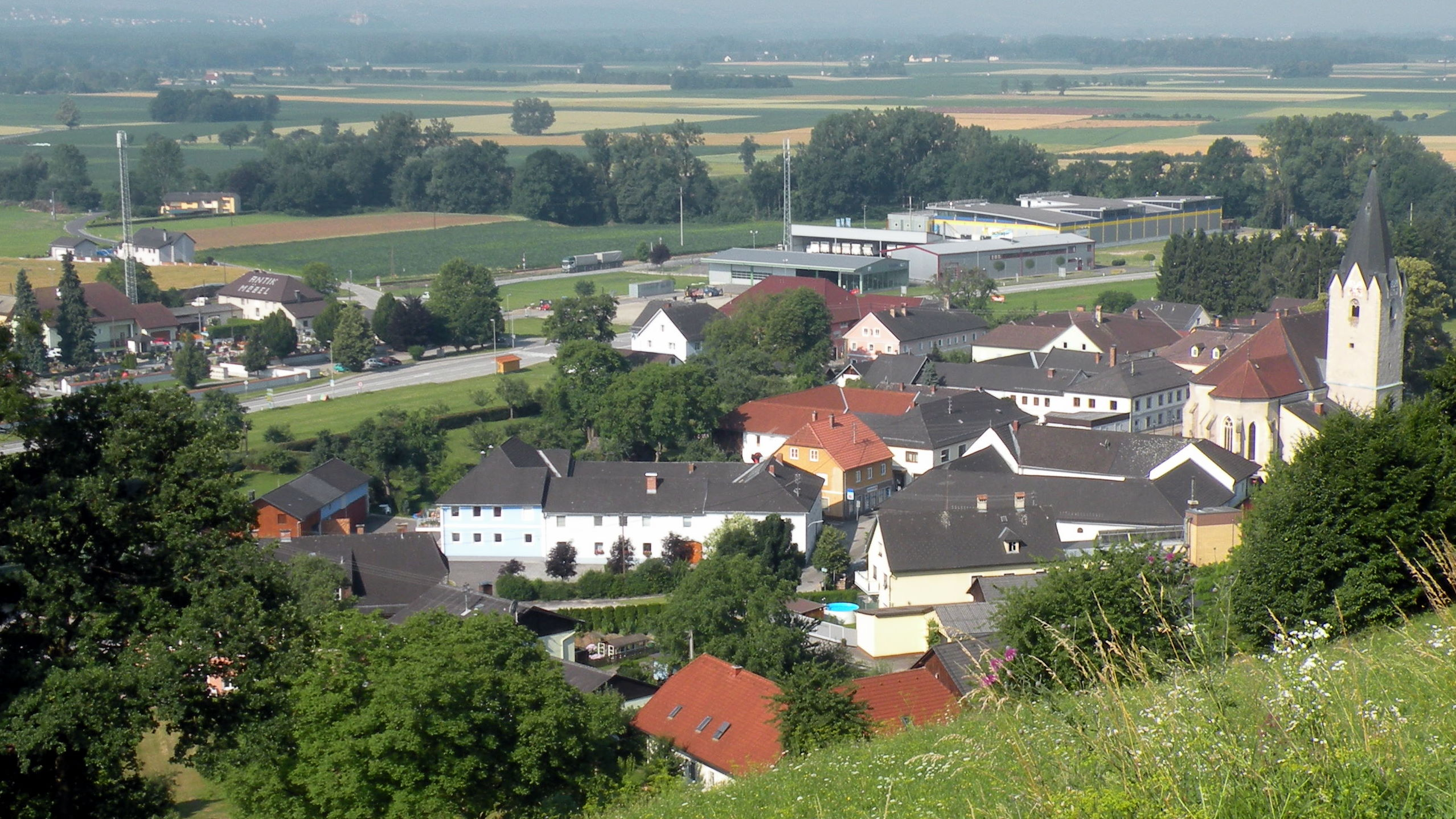 Markt Saxen im Bezirk Perg in Oberösterreich